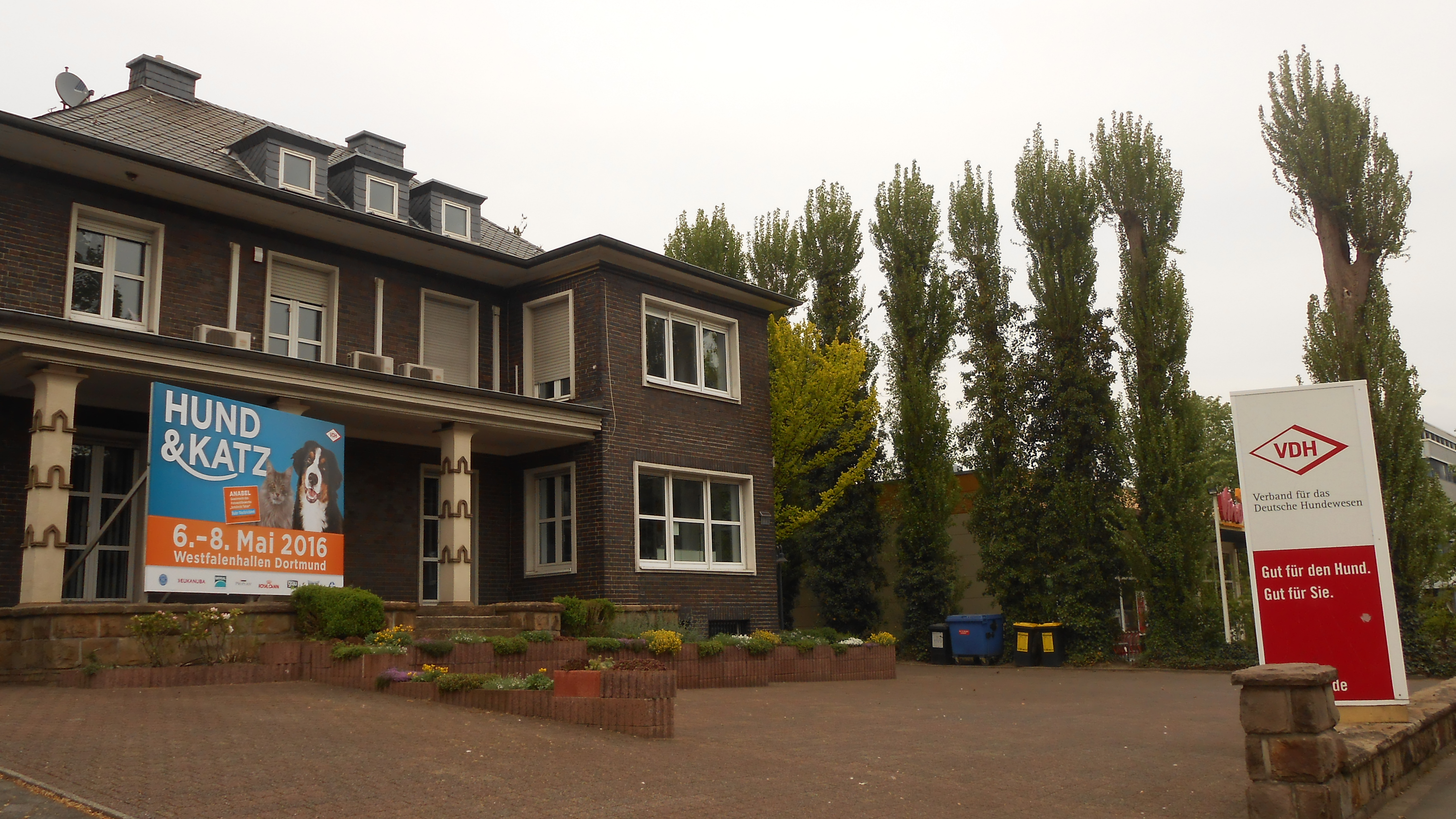 Sitz des Verbands für das Deutsche Hundewesen in Dortmund, am Westfalendamm (B1), etwas neben dem Kentucky Fried Chicken Schnellrestaurant.